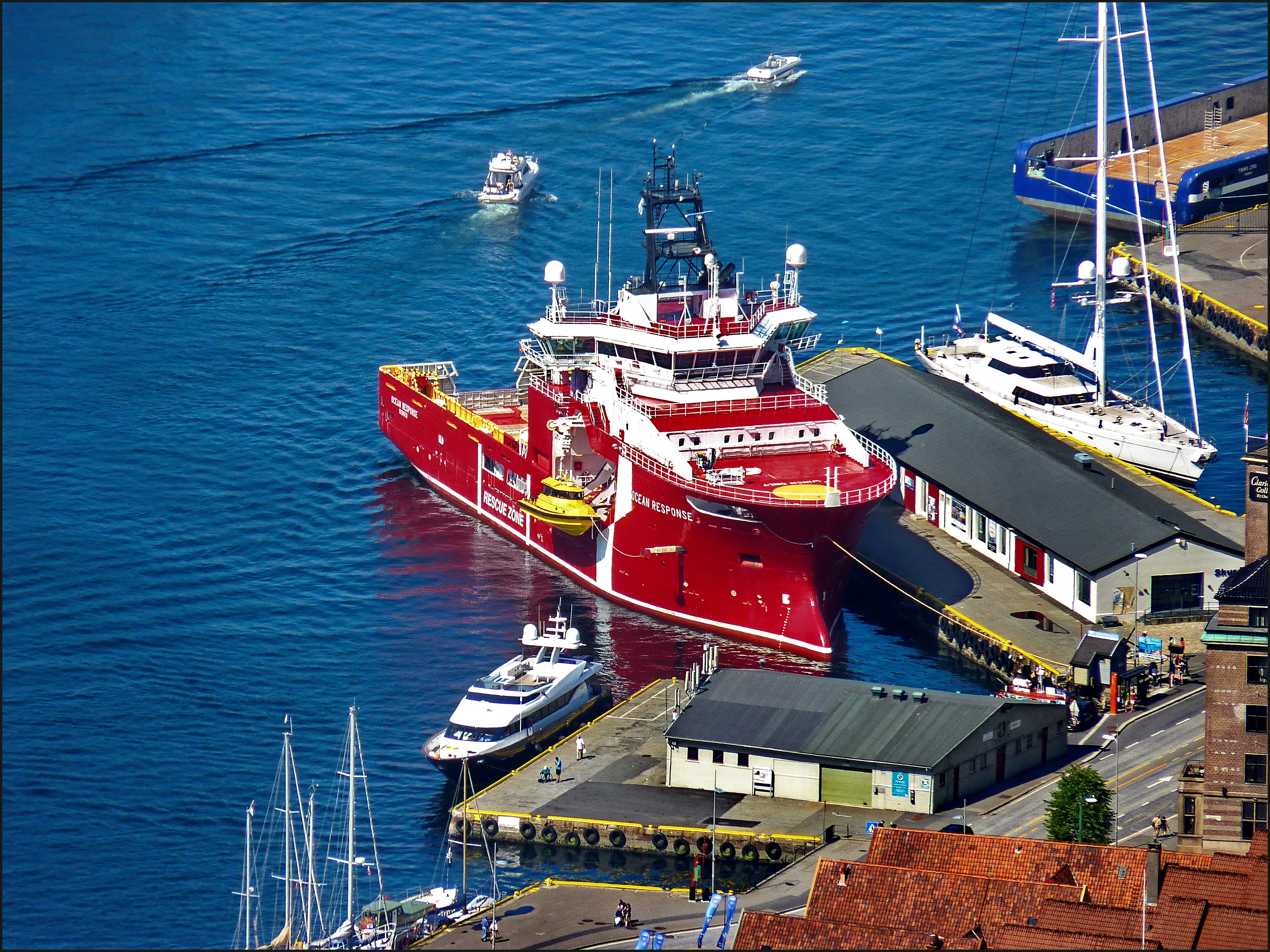 Bergen harbour